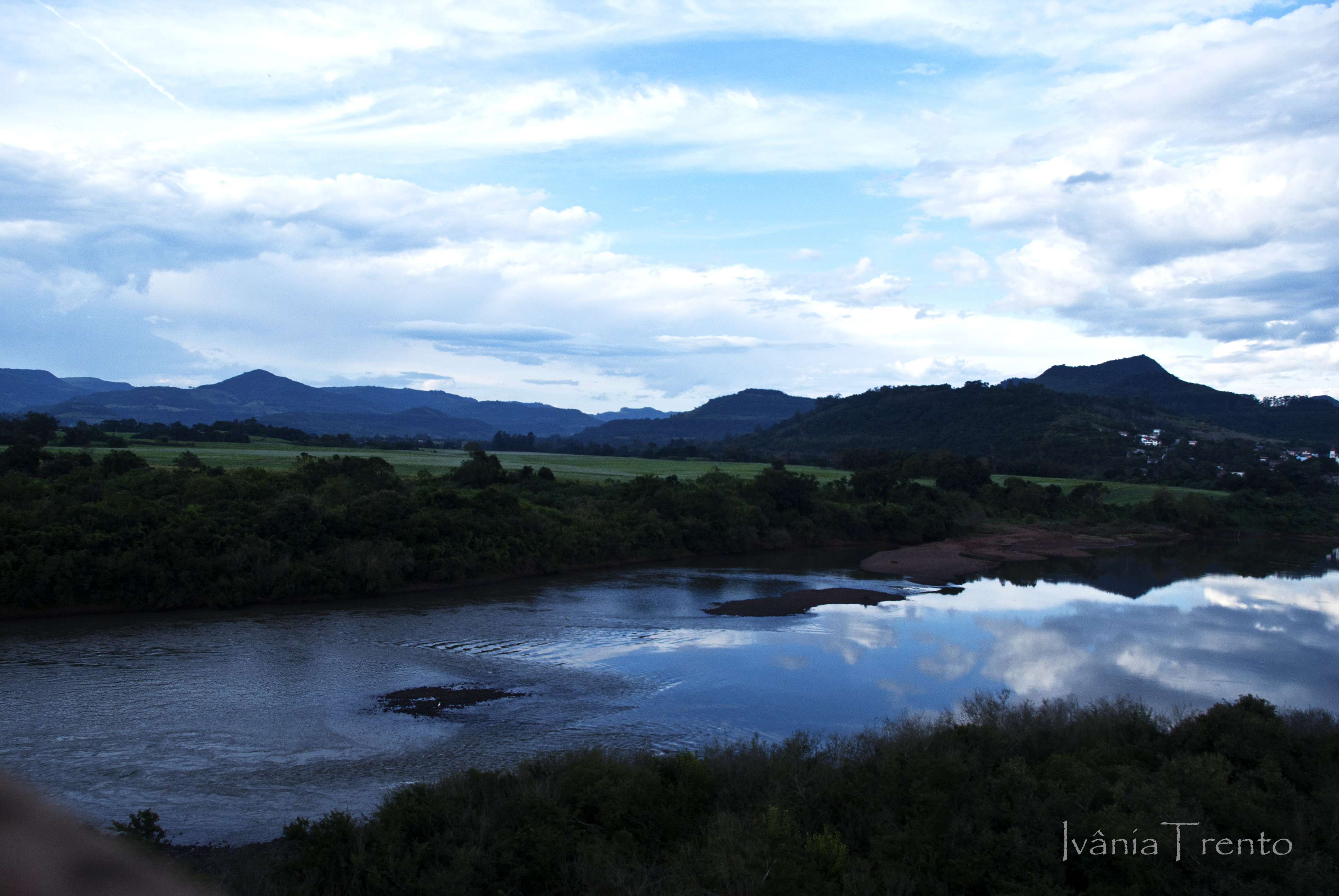 Rio Taquari- Cidade de Encantado RS Brasil